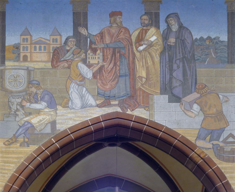 Mosaik in der Lutwinuskirche in Mettlach mit der Darstellung des Baus der Abtei